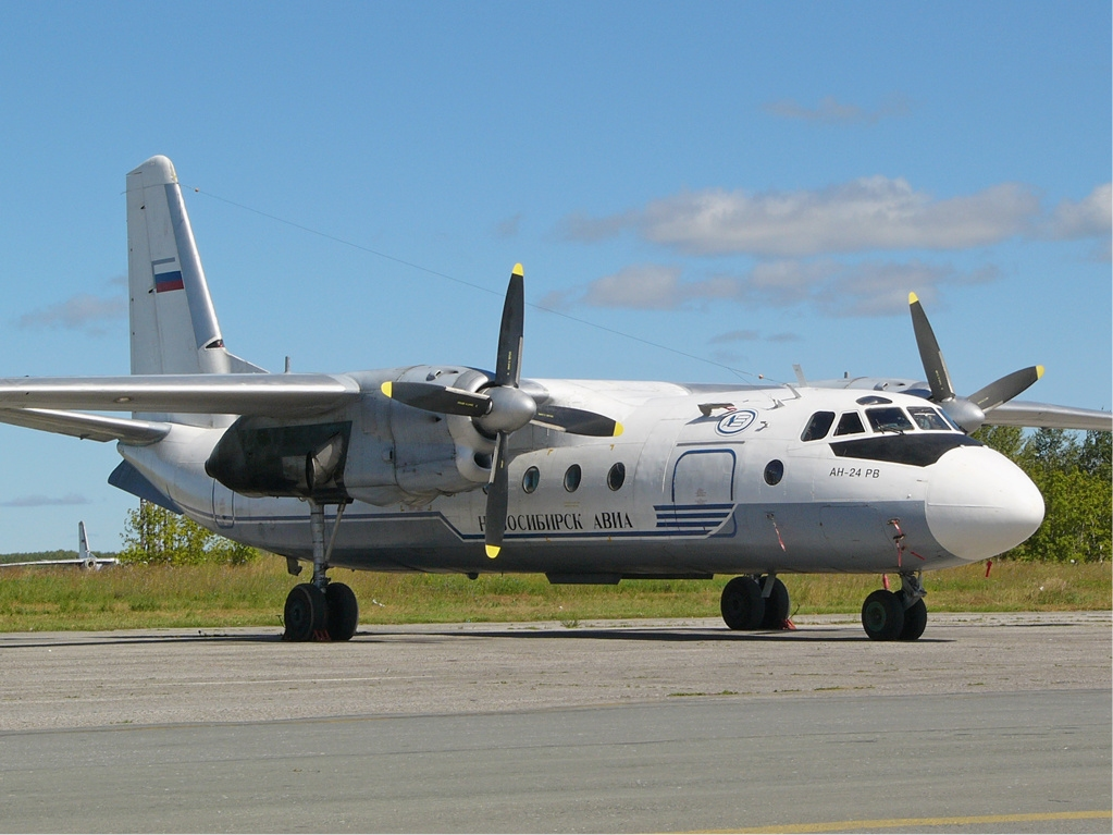 Novosibirsk Air Enterprise Antonov An-24RV